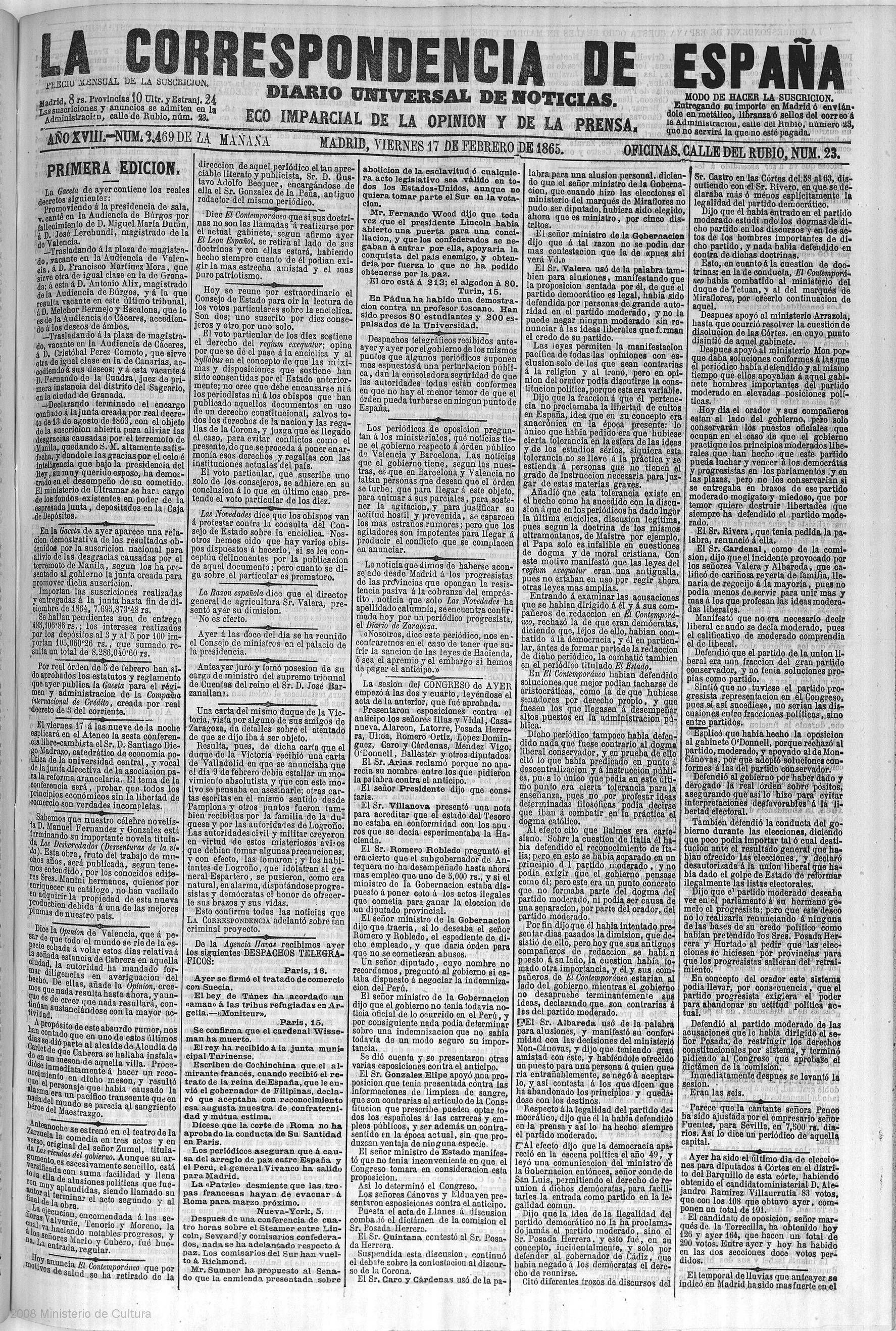 Primera página de La Correspondencia de España (17 de febrero de 1865, edición de la mañana).